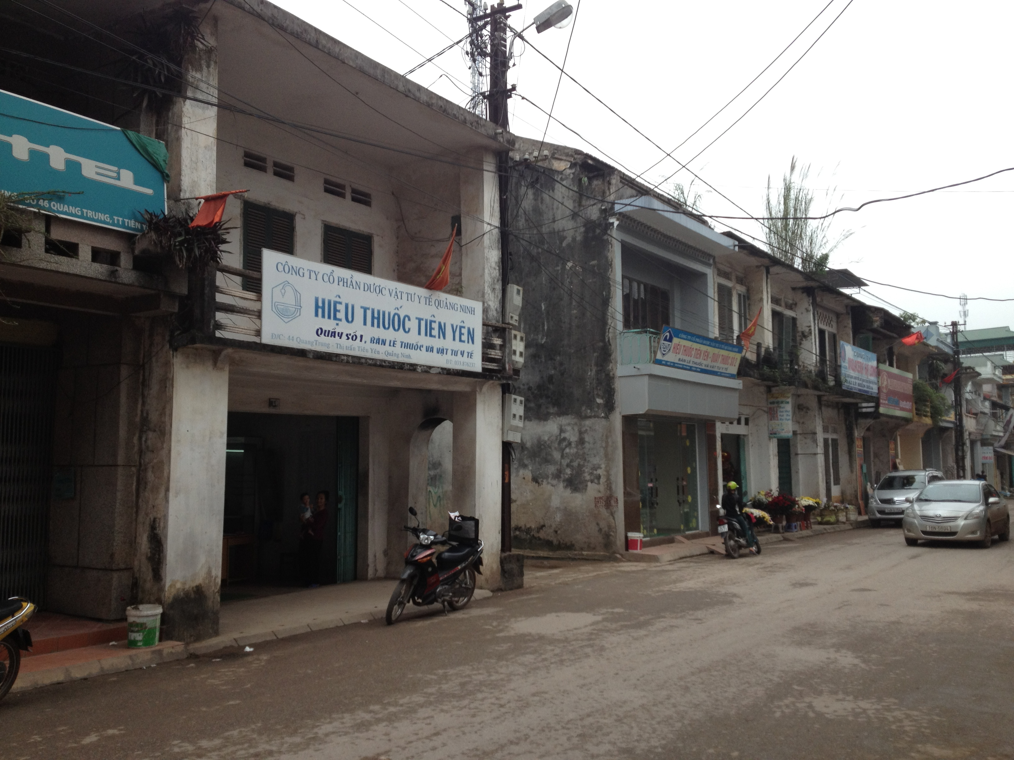 Phố Quang Trung, thị trấn Tiên Yên, Quảng Ninh